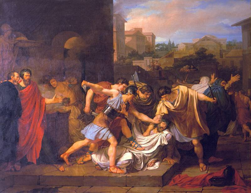 La mort de Tatius de Jacques Réattu